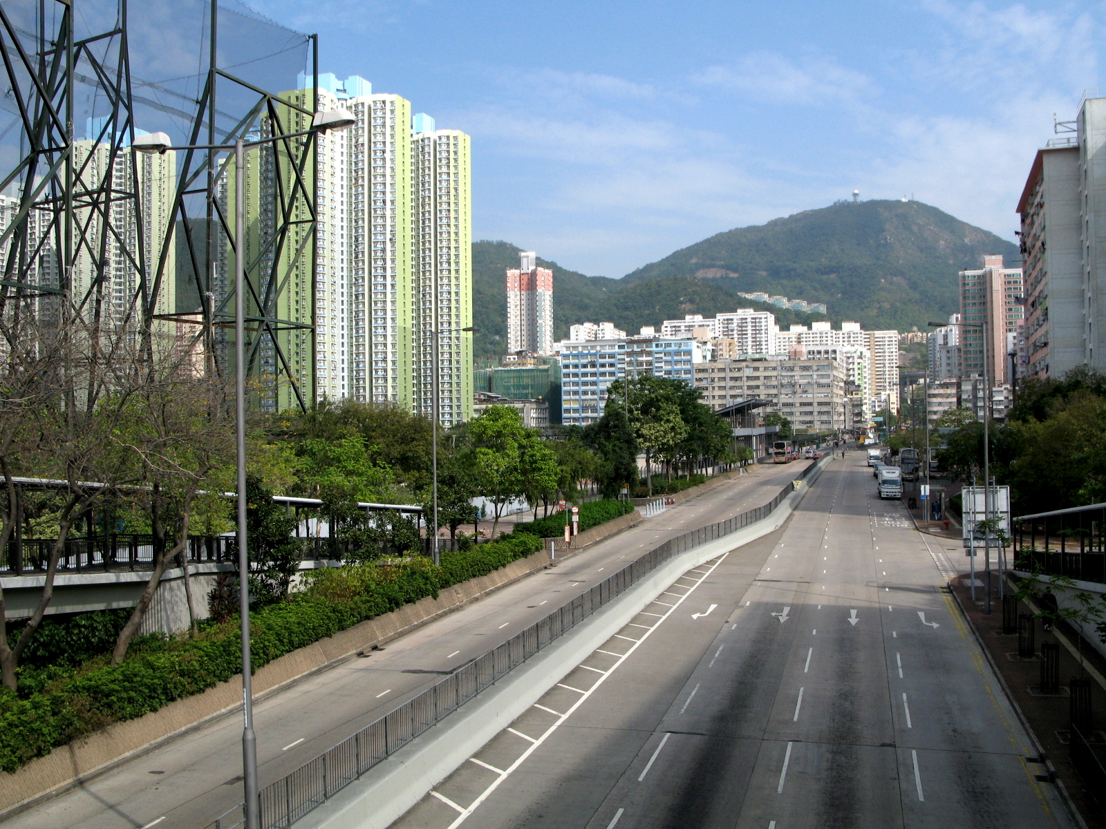 Tonkin Street 東京街